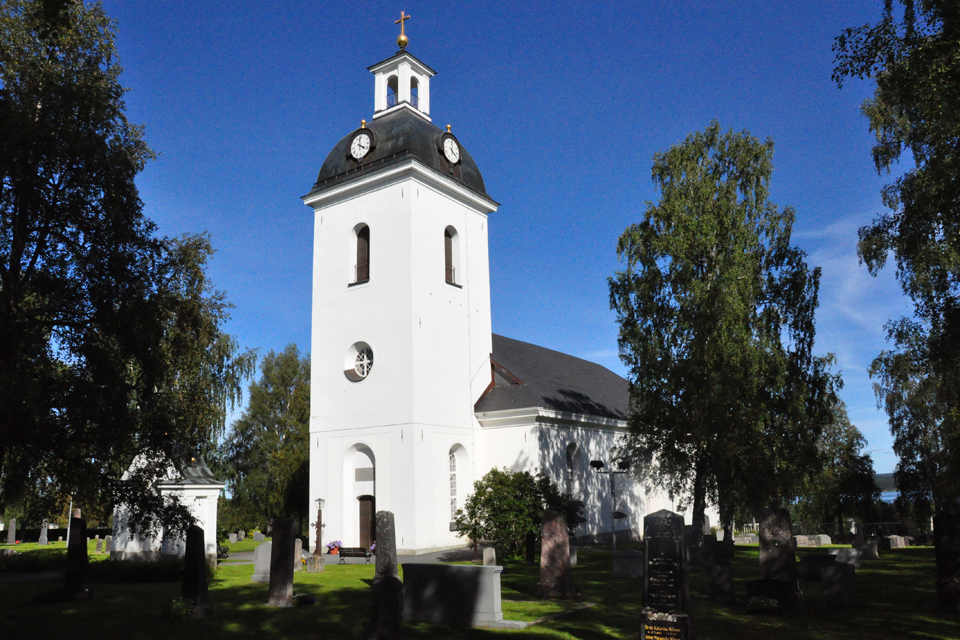 Sommarbild på kyrkan i hårt ljus. Gravplats i förgrunden.